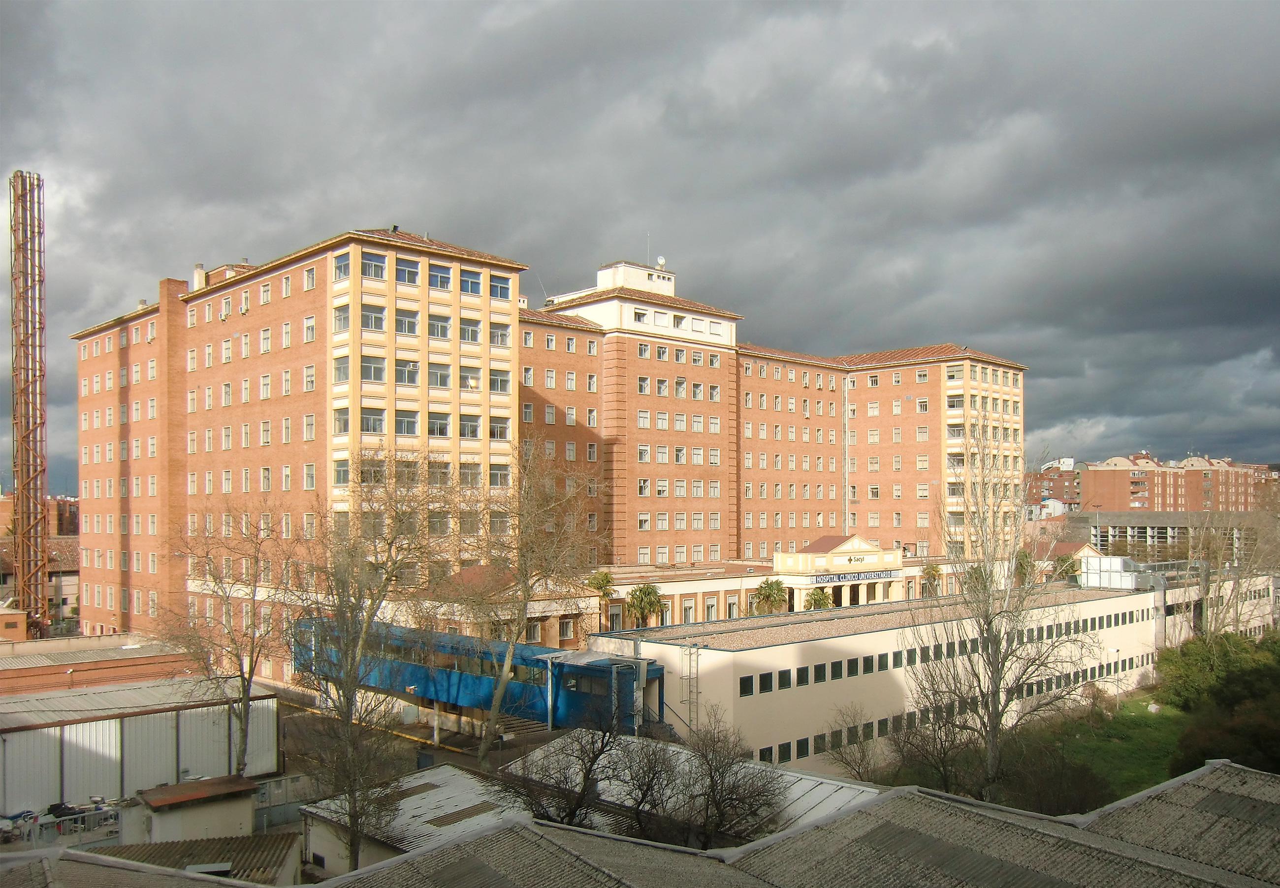 Fachada del antiguo Hospital Universitario del Río Hortega, inaugurado como Residencia Sanitaria de la Seguridad Social («la Residencia»).